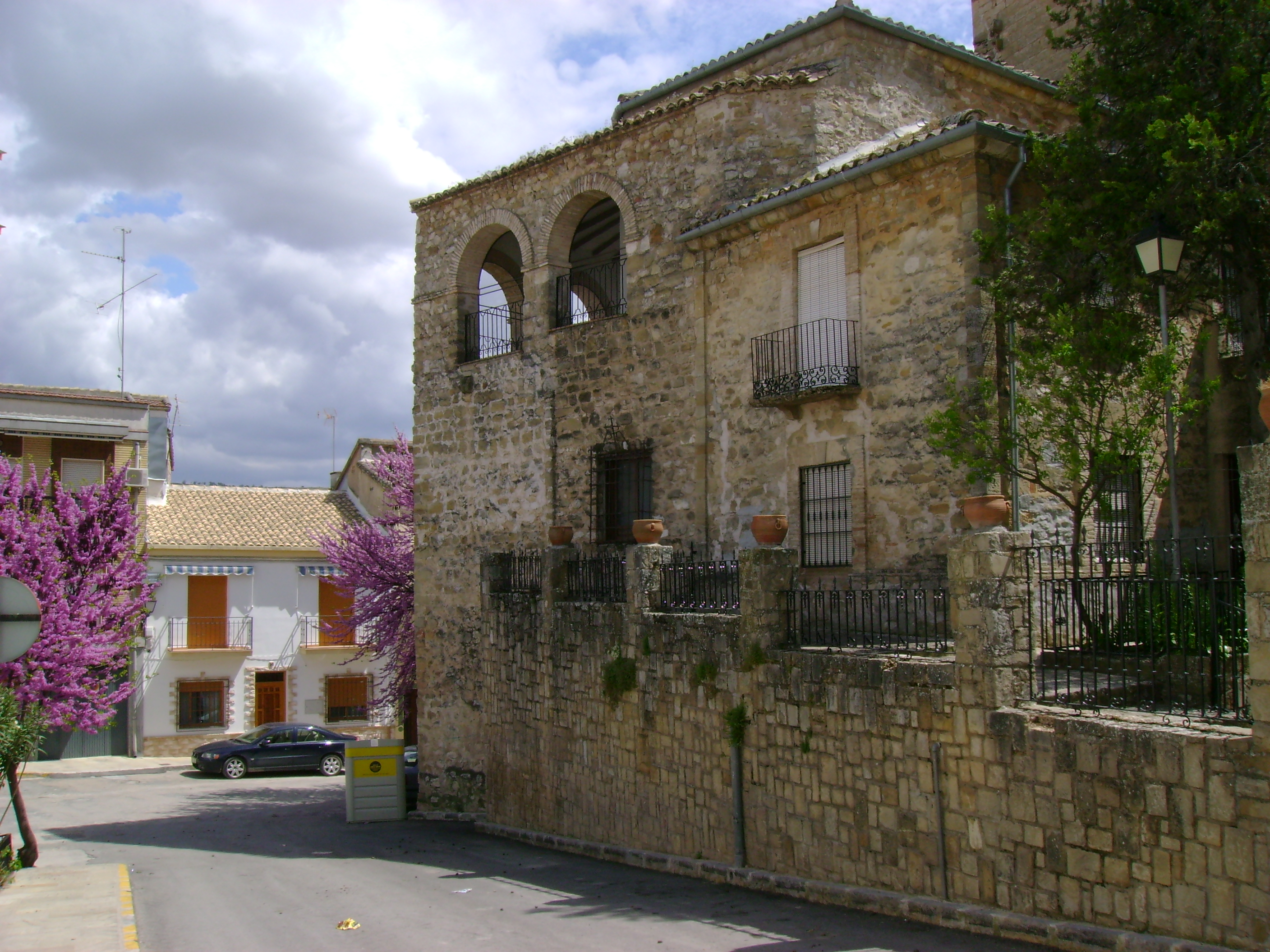 Iglesia de San Andrés en Villanueva del Arzobispo.